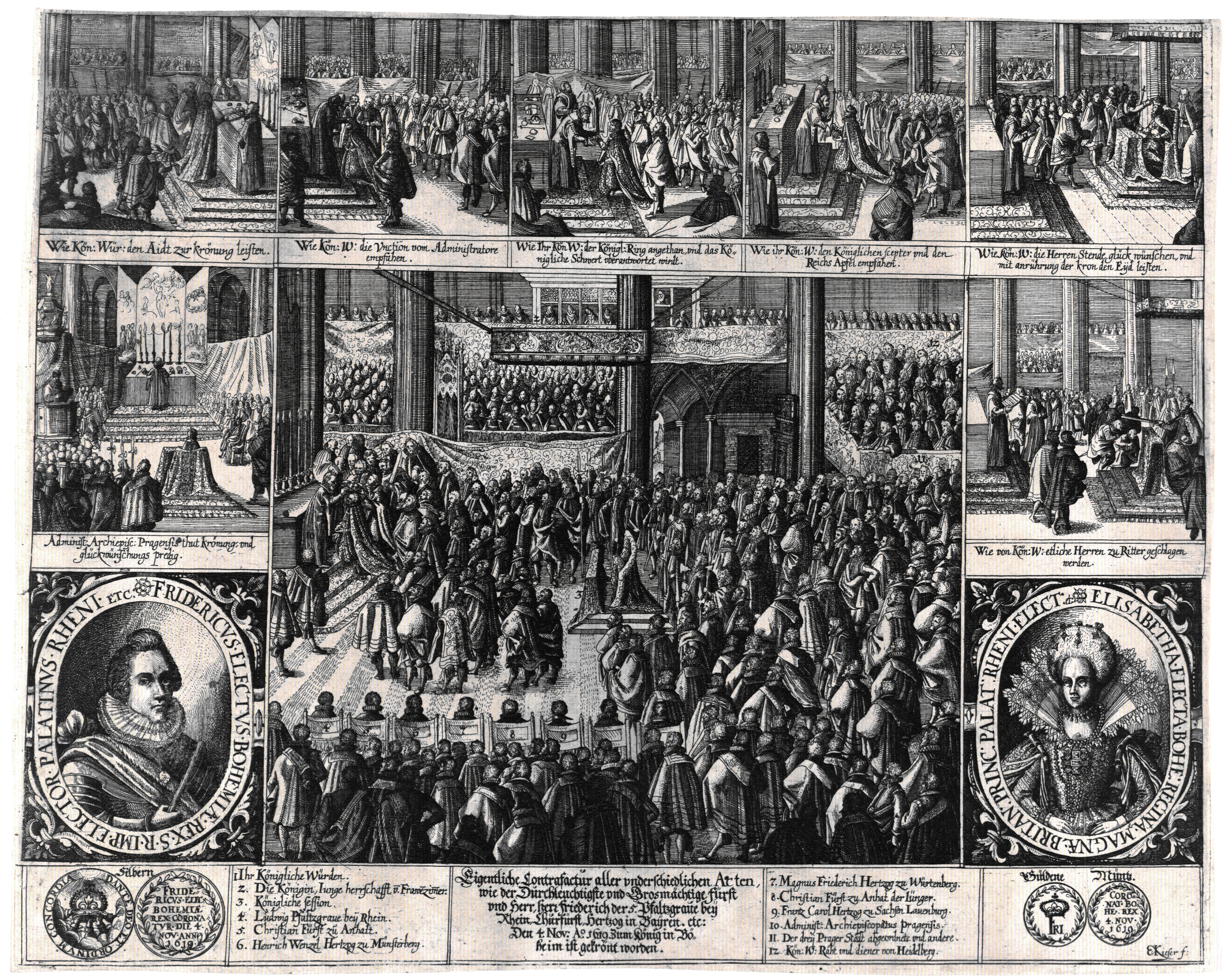 Eigentliche Contrafactur aller vnderschiedlichen Acten//wie der Durchleuchtigste vnd Grosmächtige Fürst//vnd Herr, Herr Friederich der 5. Pfaltzgraue beÿ//Rhein … 1619 … zum König ist gekrönt worden, Radierung von Eberhard Kieser, 1619